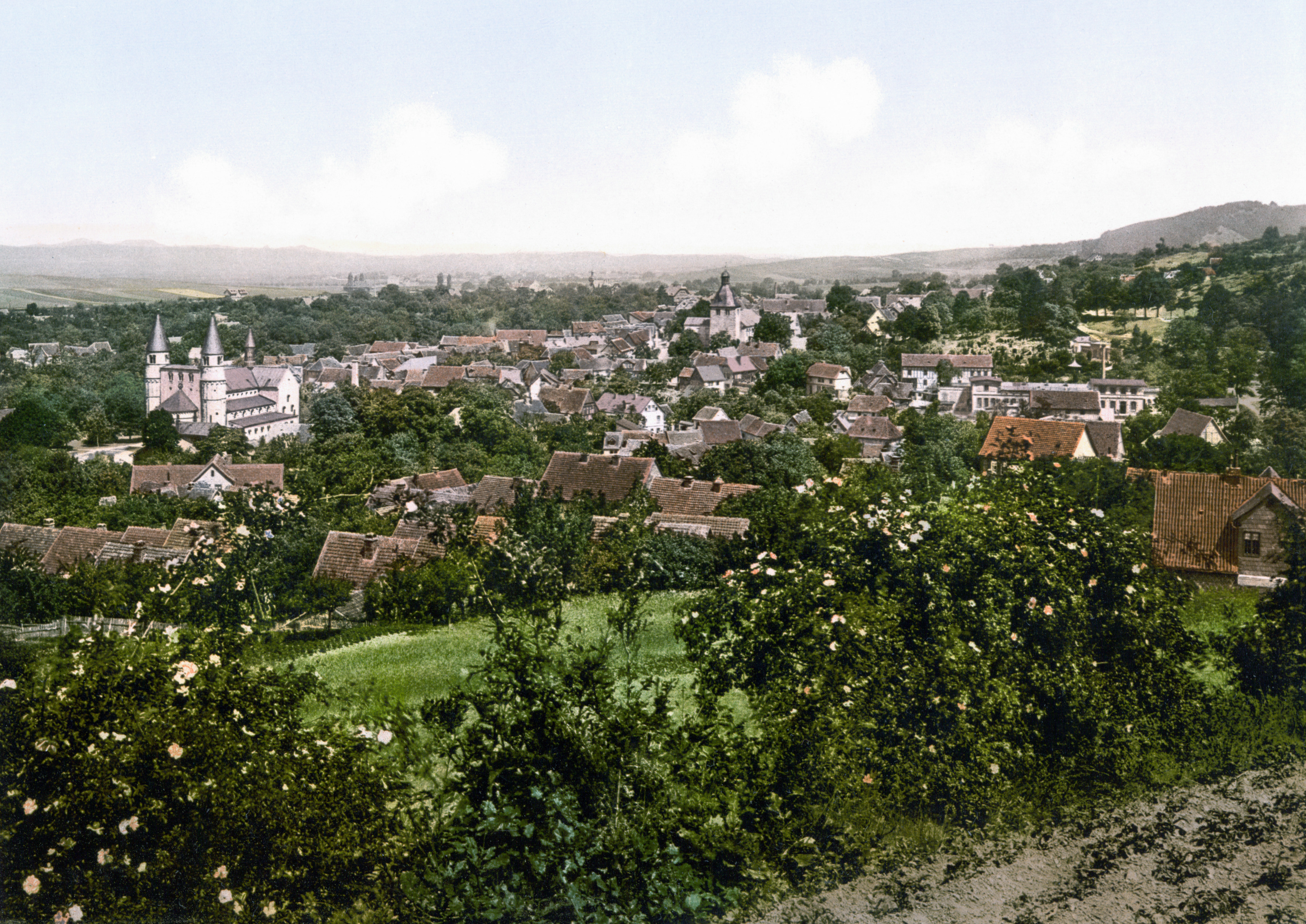 Gernrode